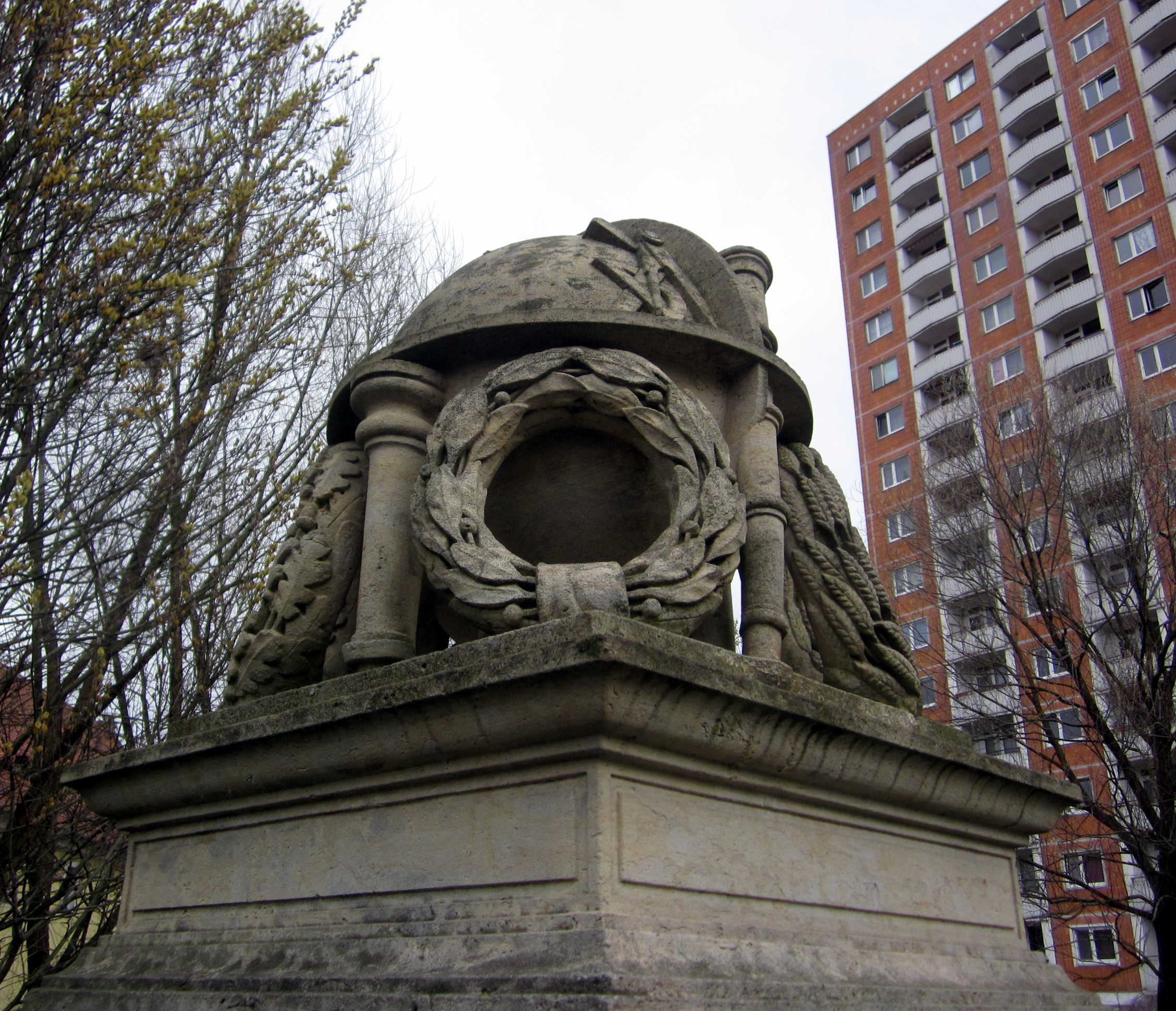 Dresden Prohlis Palitzschdenkmal 1988 Detail Kranz NE